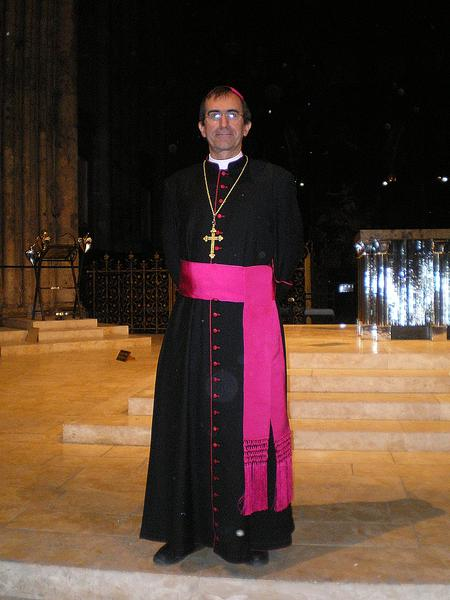 Mgr Michel Pansard dans le choeur de la cathédrale de Chartres, devant l'autel et l'ambon de Goudji.